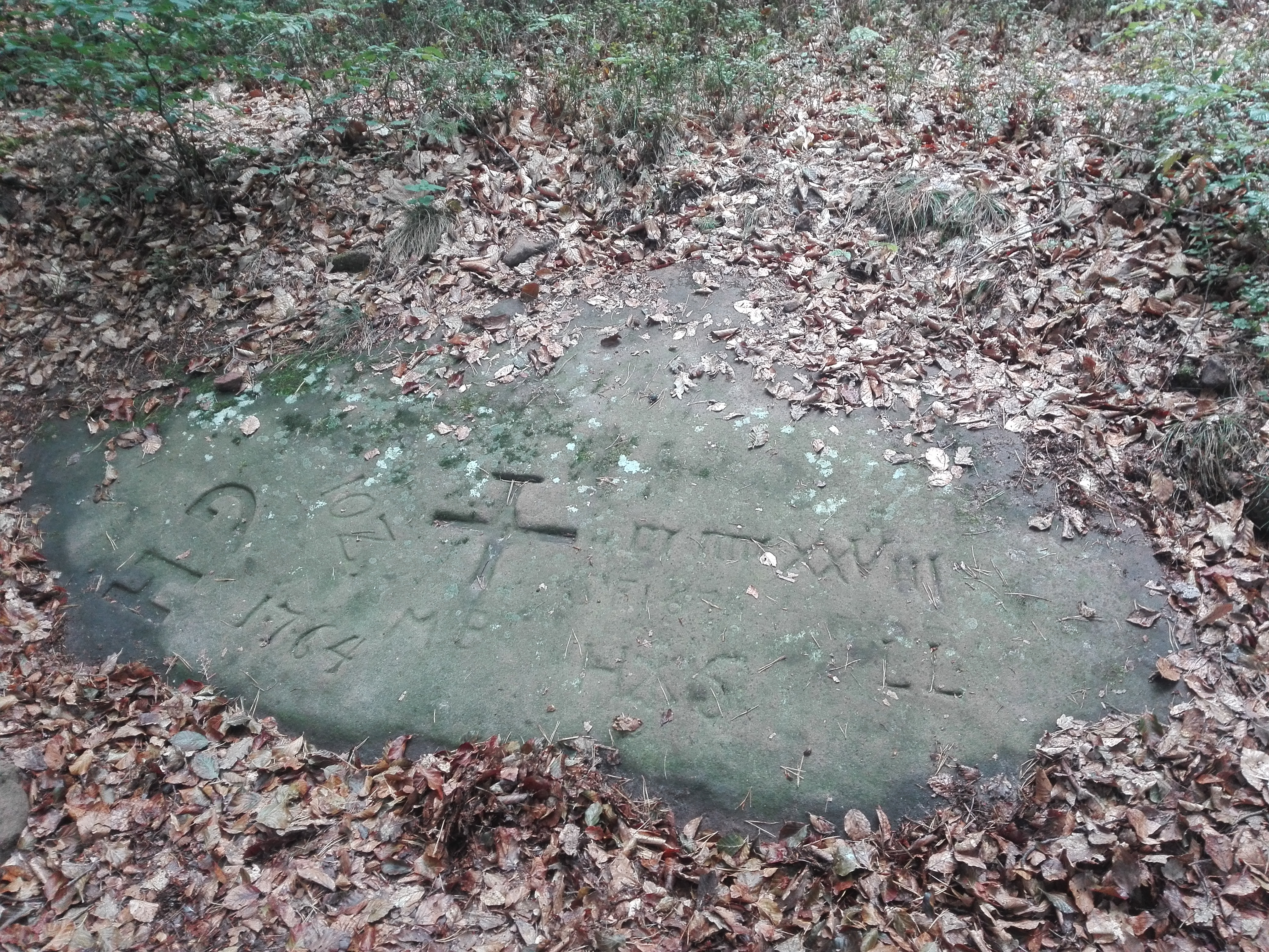 Loogfels Nr. 102. Bezeichnete ehedem die Grenze zwischen Deidesheim und Grävenhausen. Er liegt nahe Lambrecht auf dem Kreuzberg